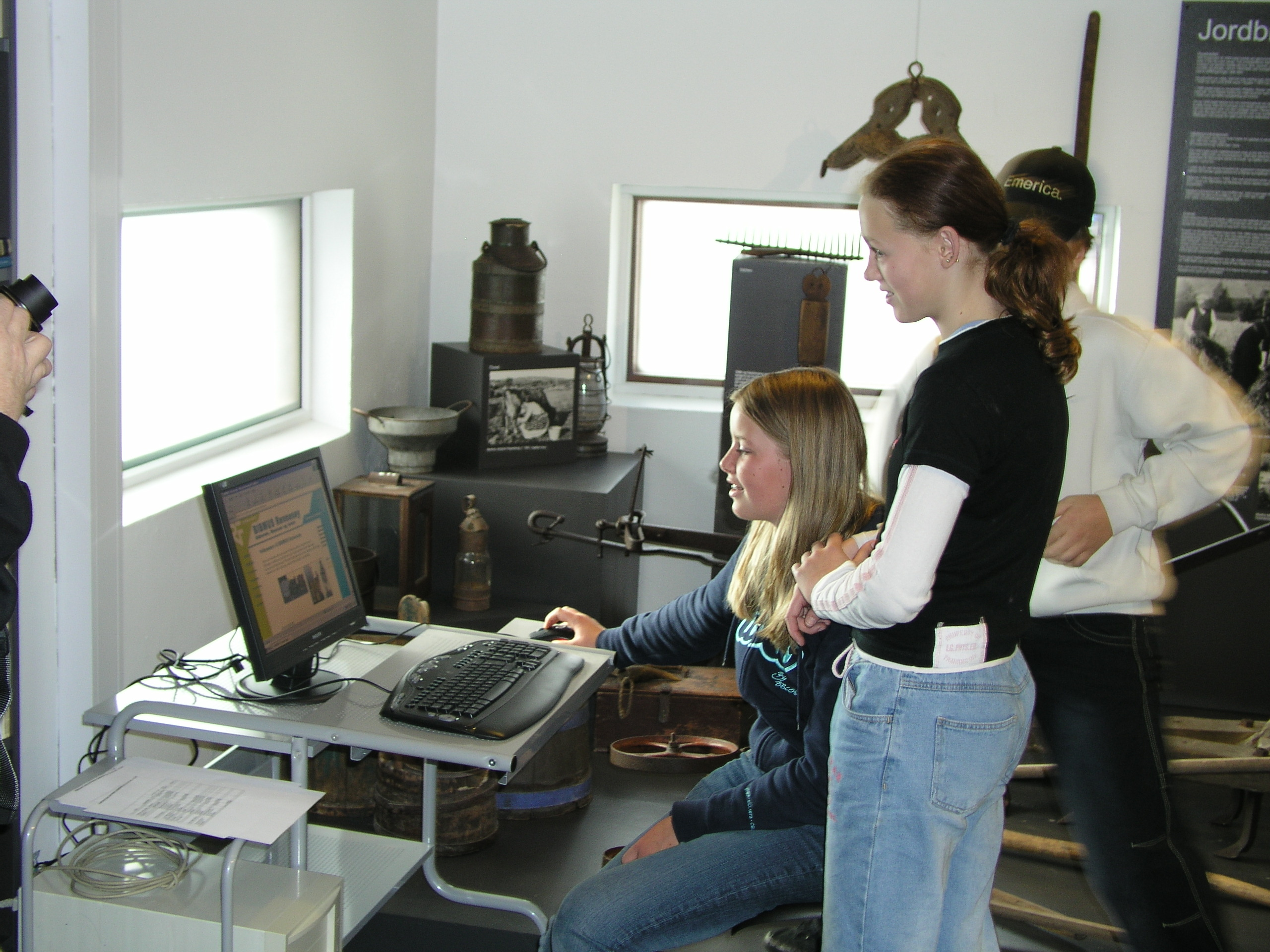 Bibmus i Rennesøy er kombinert museum og bibliotek. Avdeling av Ryfylkemuseet.